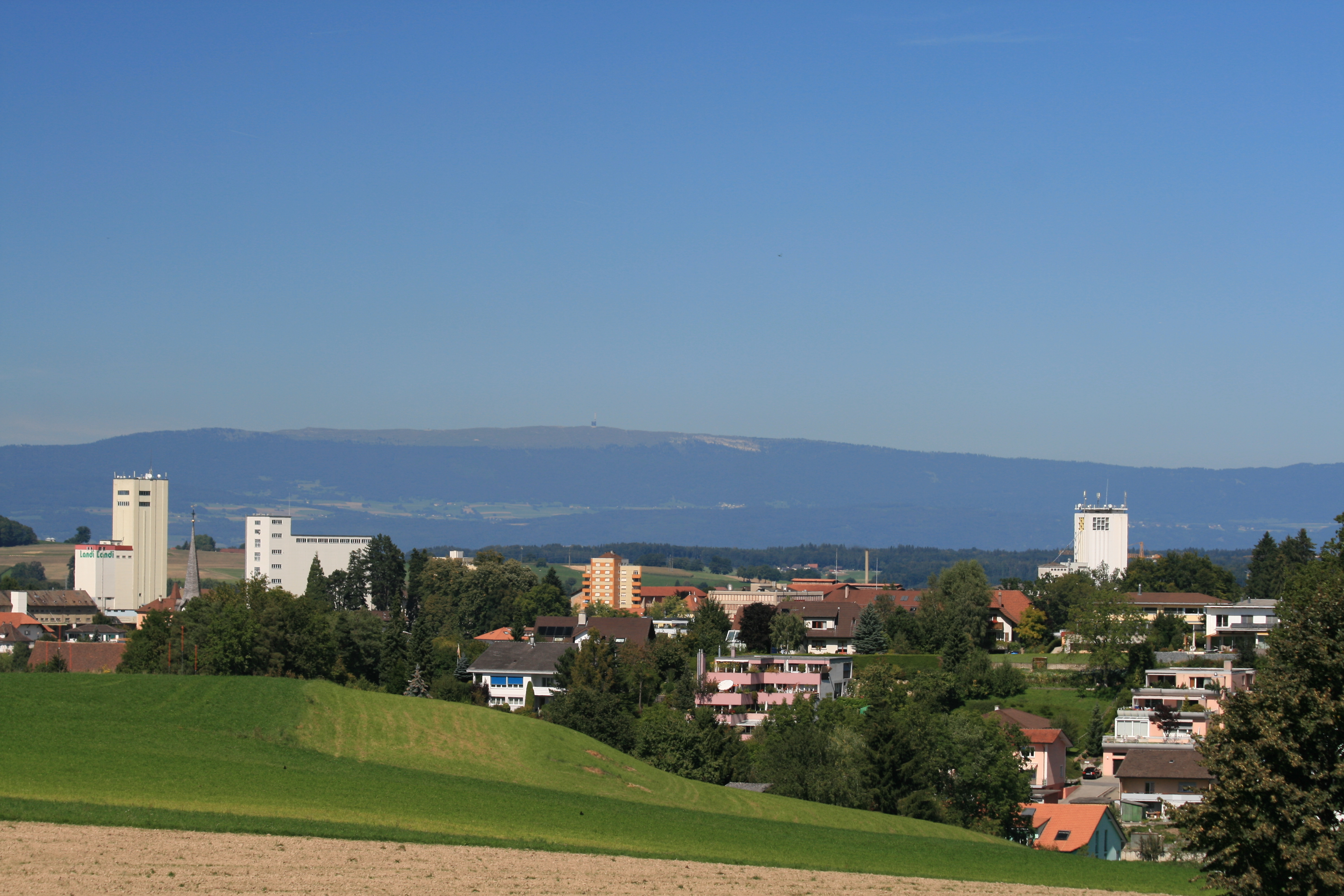 Düdingen, Kanton Freiburg, Schweiz